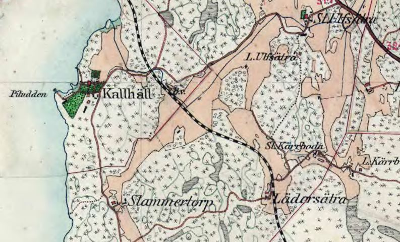 Kallhäll på Häradsekonomiska kartan